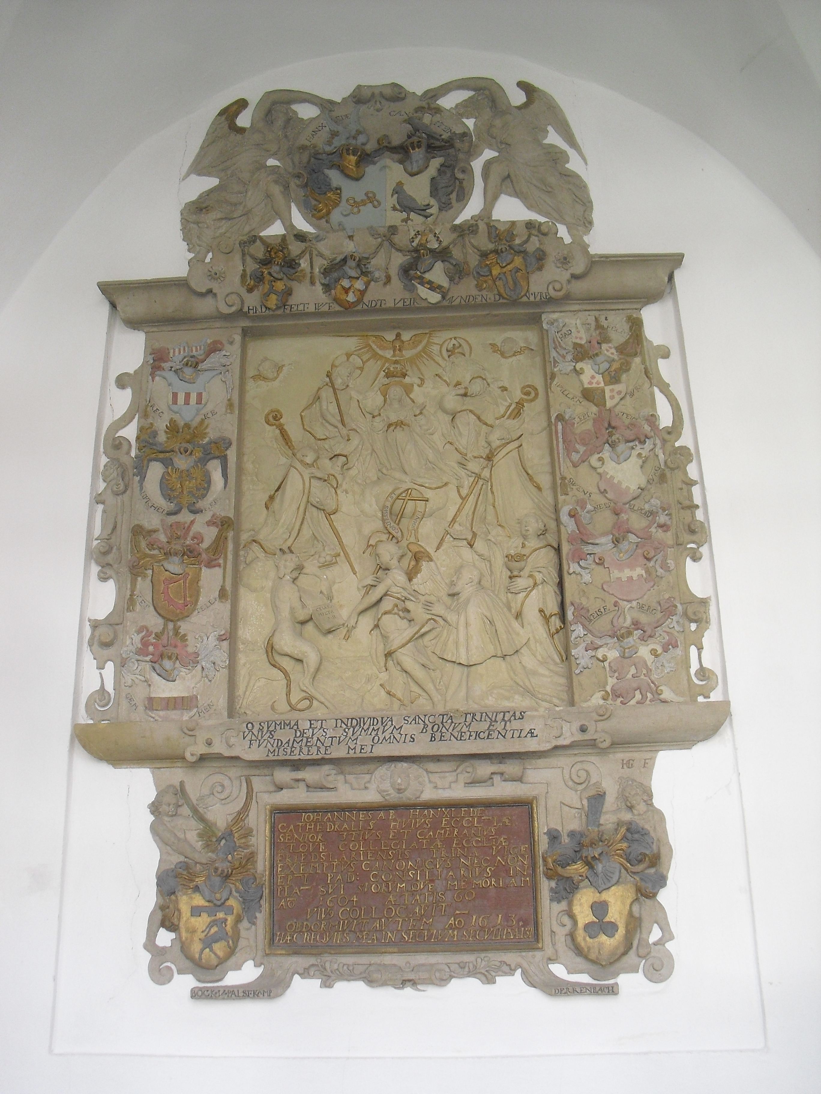 Epithaph Johann von Hanxleden im Paderborner Dom